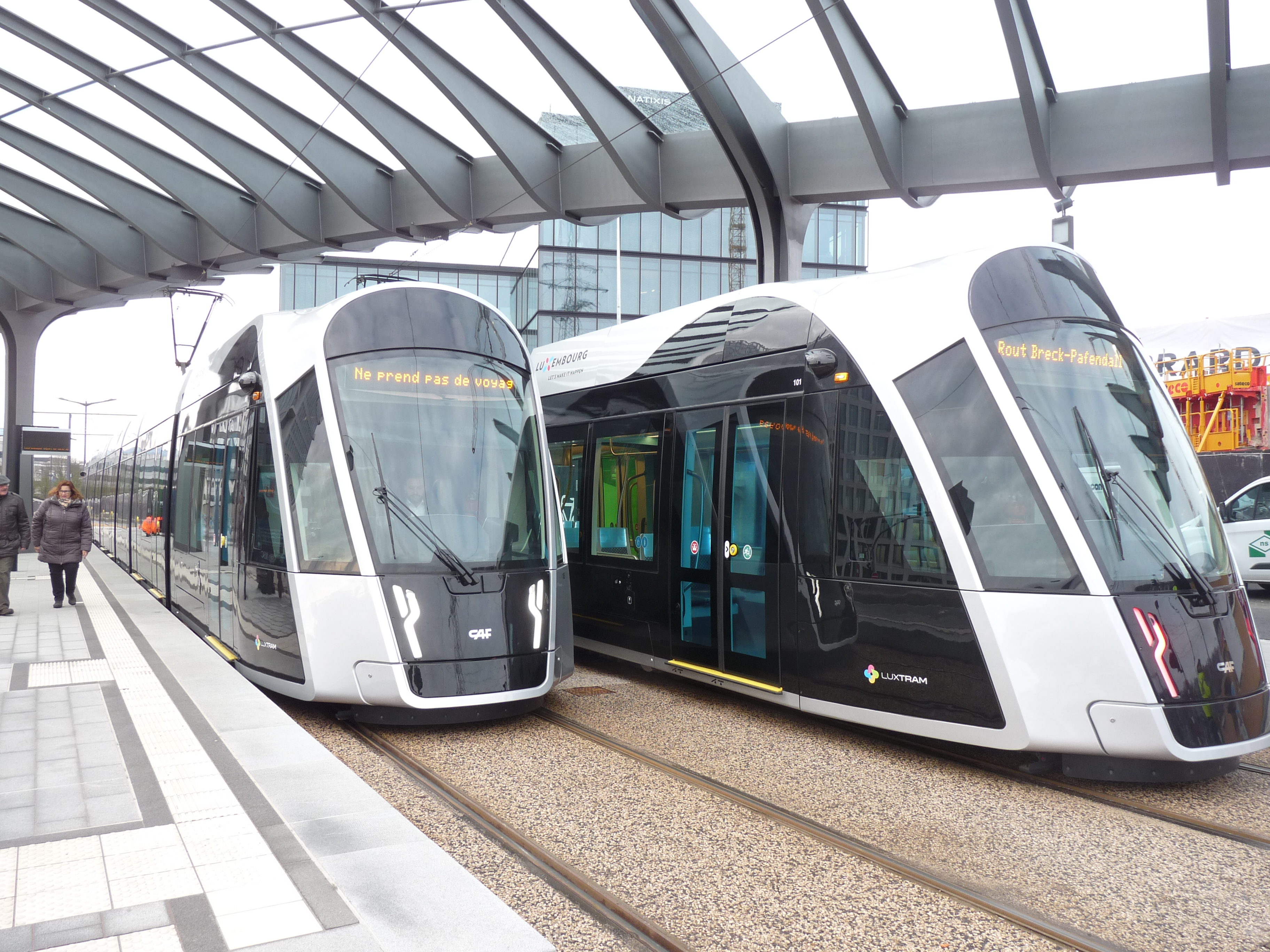 De tram in Luxemburg stad